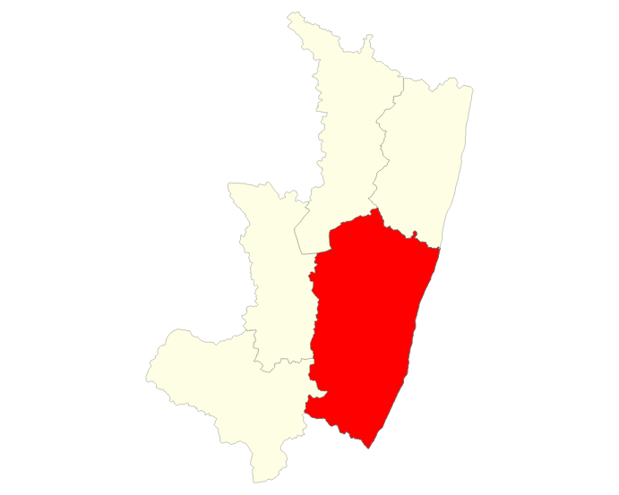 Localisation du district de Vangaindrano dans la région Atsimo Atsinanana